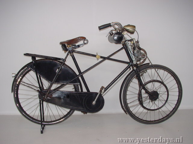 Rex bromfiets 1956.